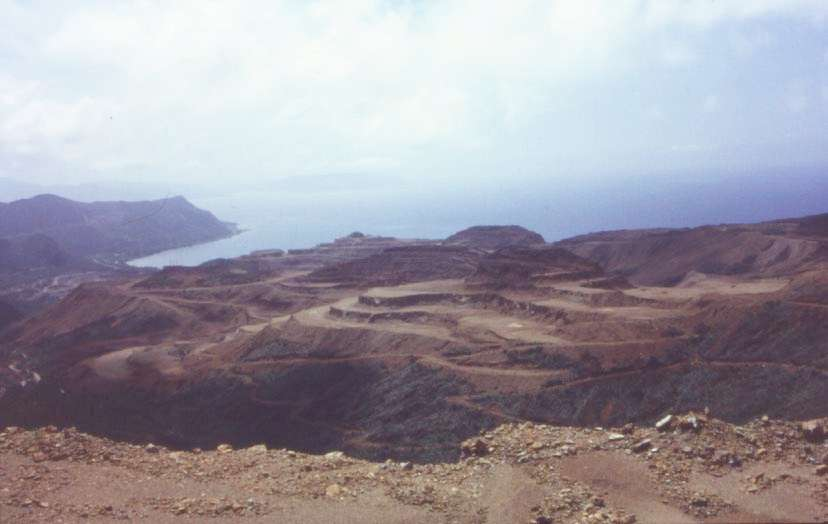 Bergbaugebiet bei Kouaoua im südosten Neu Kaledoniens. Aufgrund der geringen Tiefenlage der Erze werden die Berge terrassenförmig abgetragen. Mining region of Kouaoua, New Caledonia